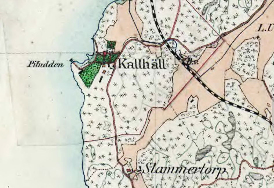 Kallhäll och Slammertorp